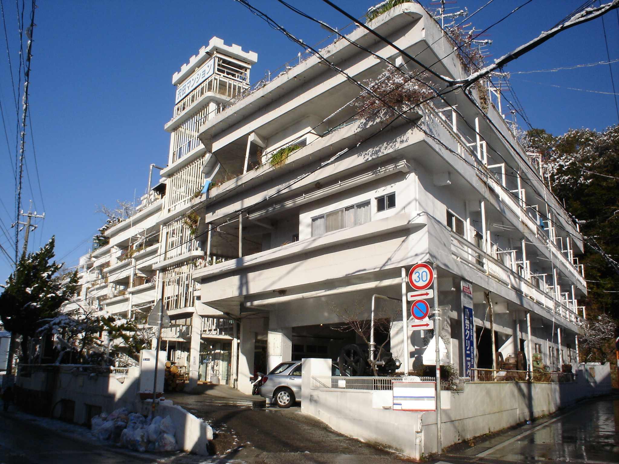 sawaman,kochi,2005